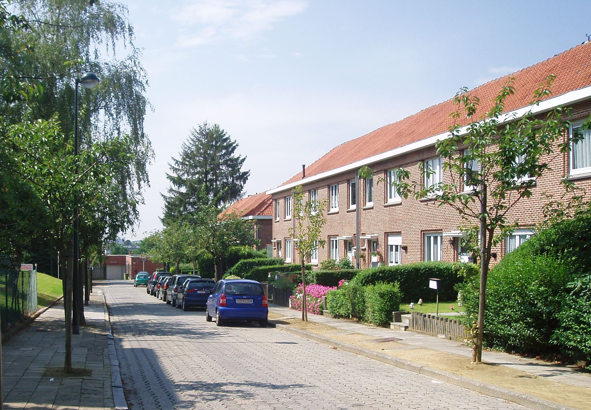 rue Emile Rotiers Auderghem Belgium